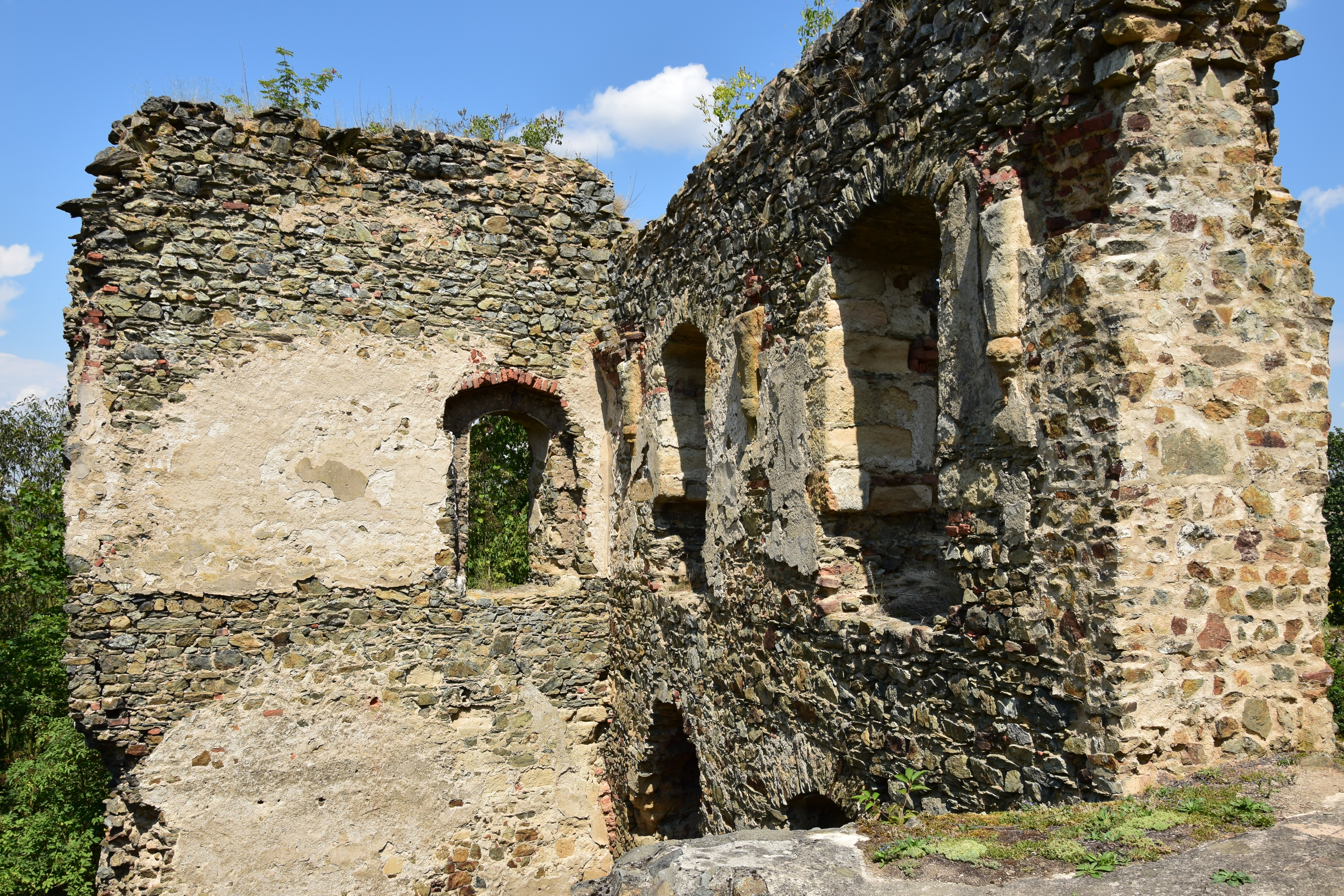 Roupov – interiér věžového paláce